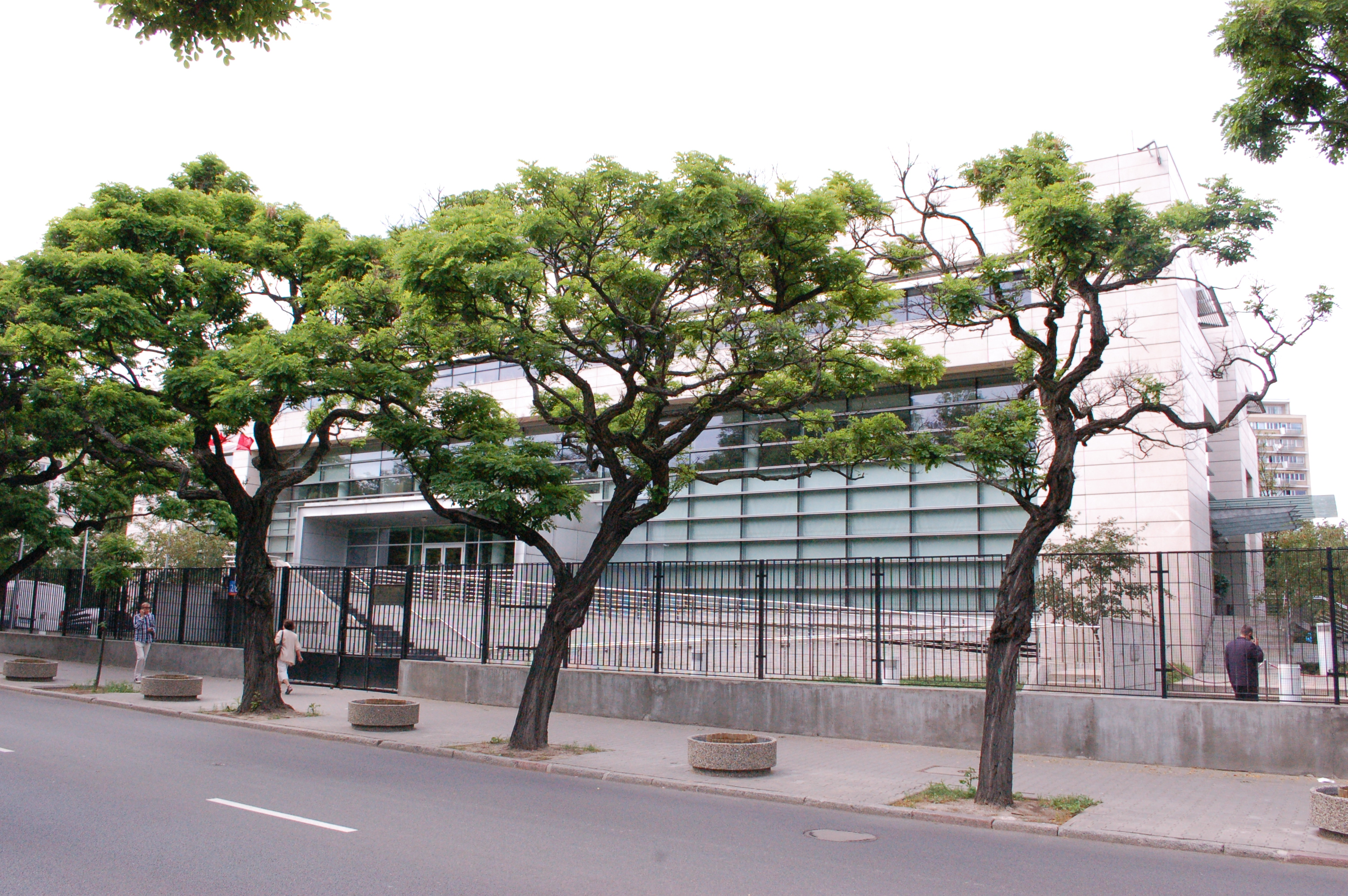 Warschau